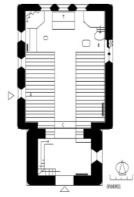 Grundriss. Dorfkirche Grüssow, Landkreis Mecklenburgische Seenplatte